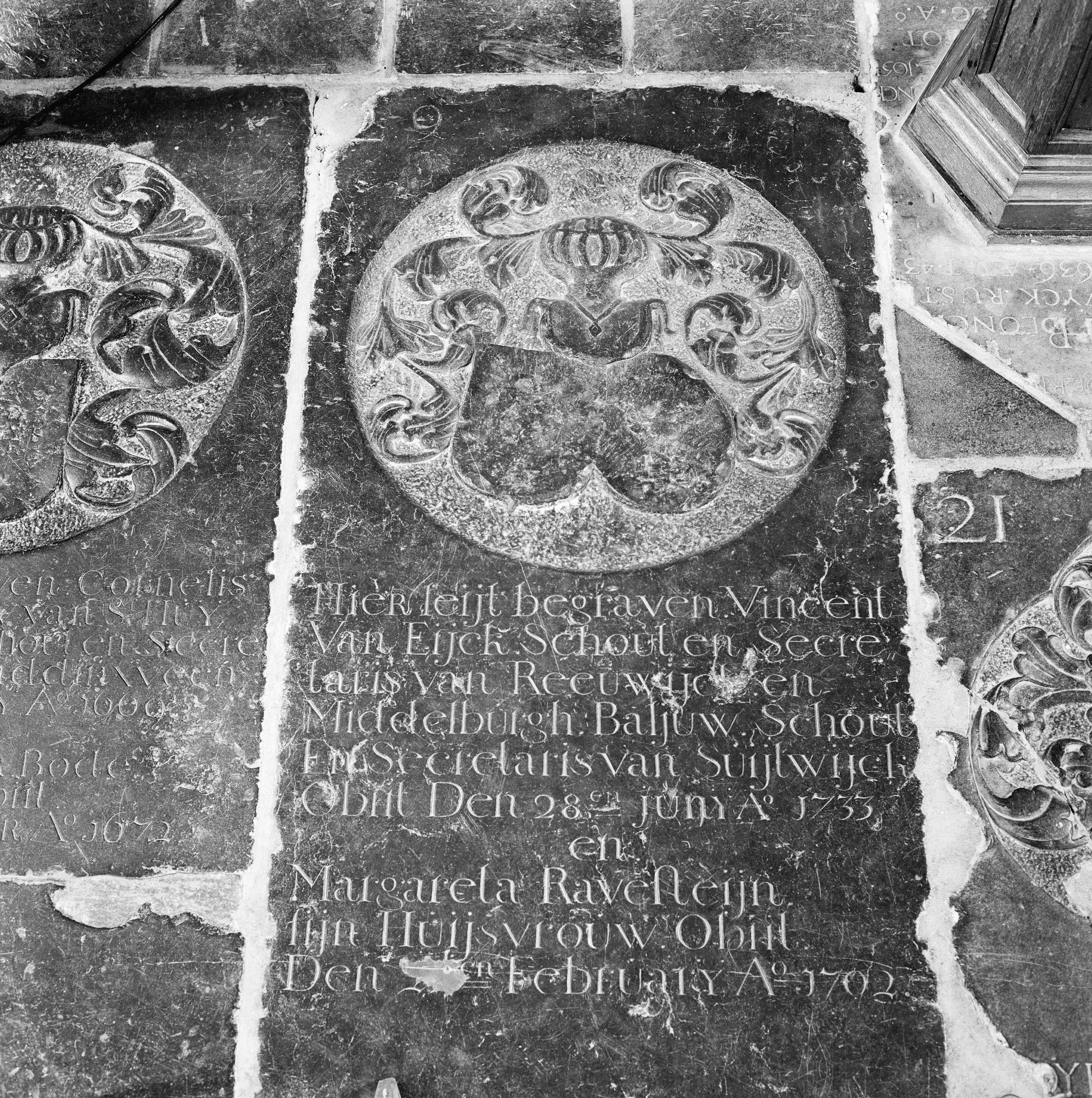 Nederlands Hervormde Kerk: Interieur, grafzerk in koor, V. van Eijck, schout en secretaris van Reeuwijk en Middelburgh etc. (opmerking: Gefotografeerd voor Het Monumentale Hart van Holland)